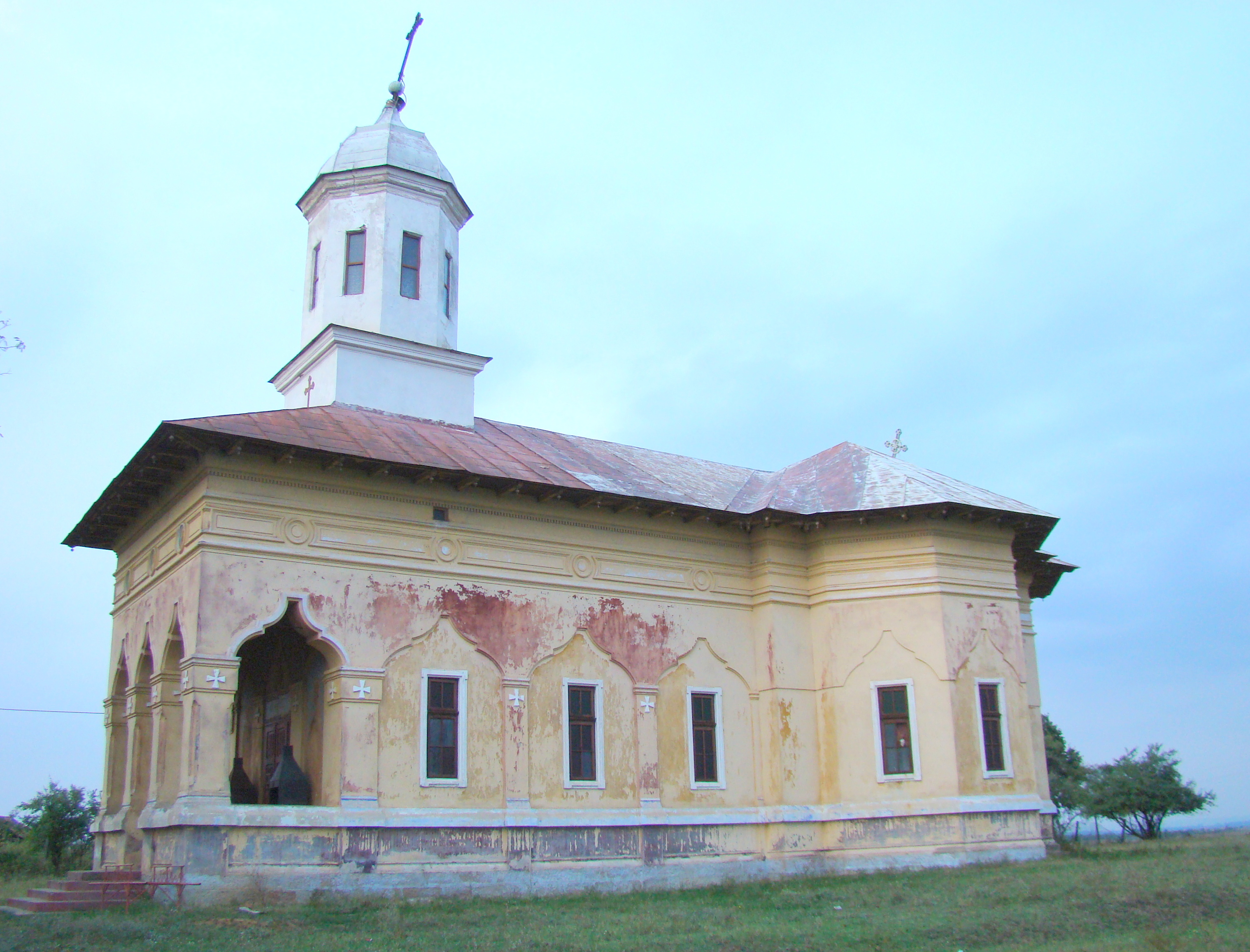 Biserica ortodoxă din Izvoarele-Mehedinți